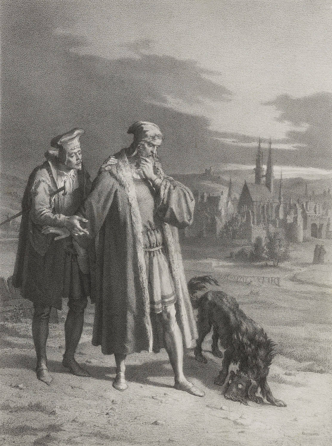 Faust und Wagner auf dem Spaziergang